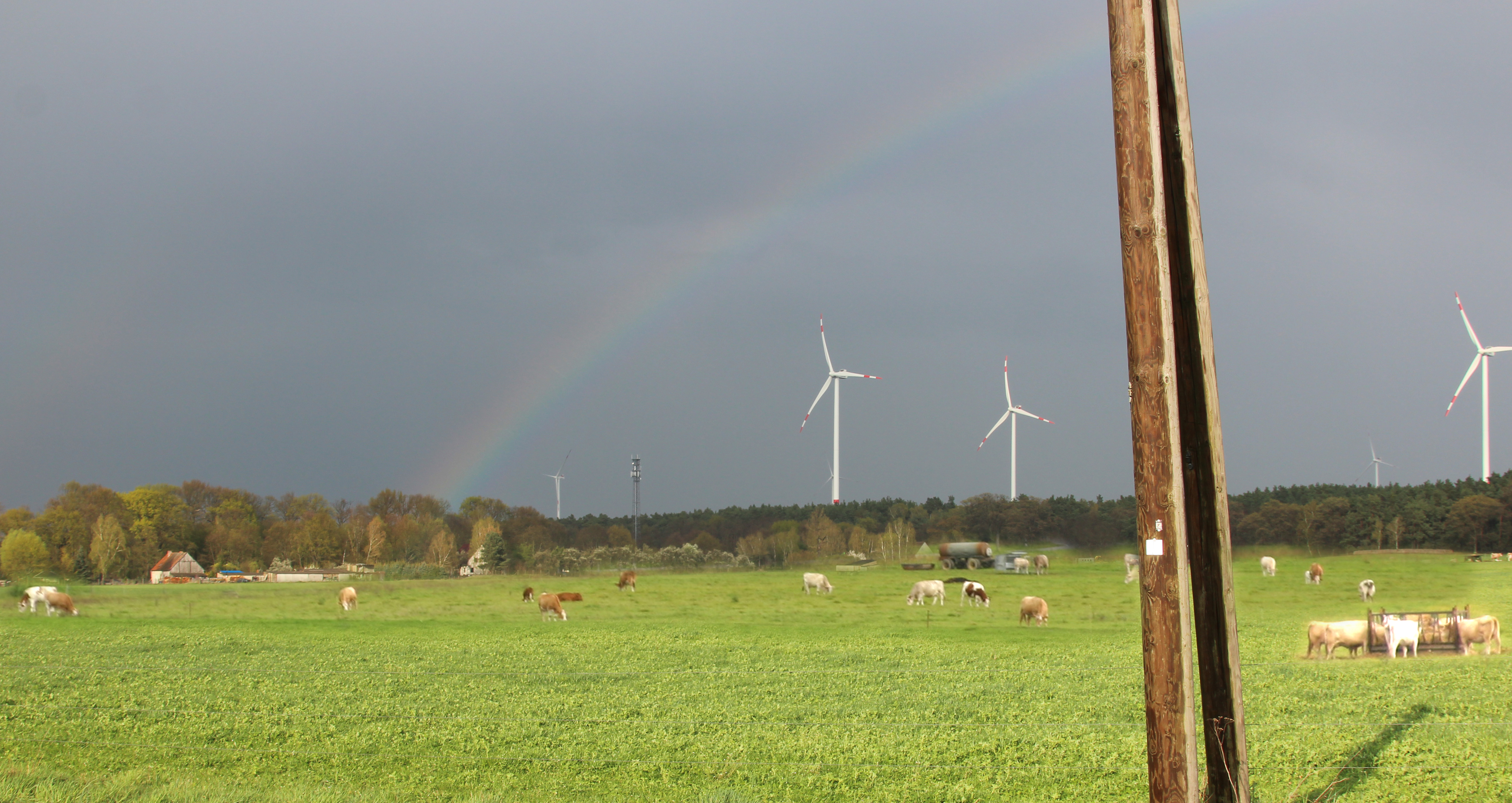 Klein-Mehßow Ortslagen